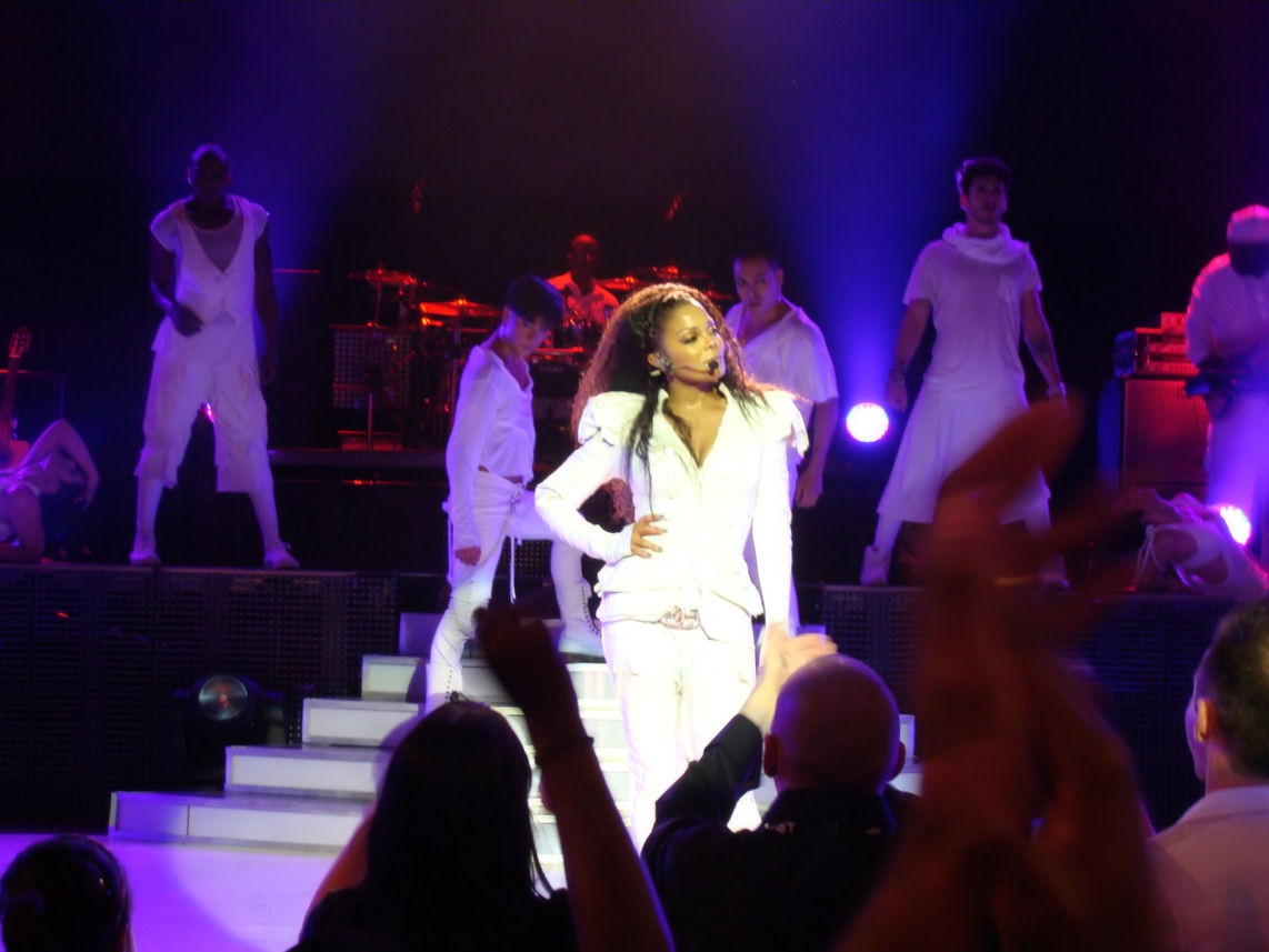 30 - Janet Jackson - Royal Albert Hall 2-7-2011